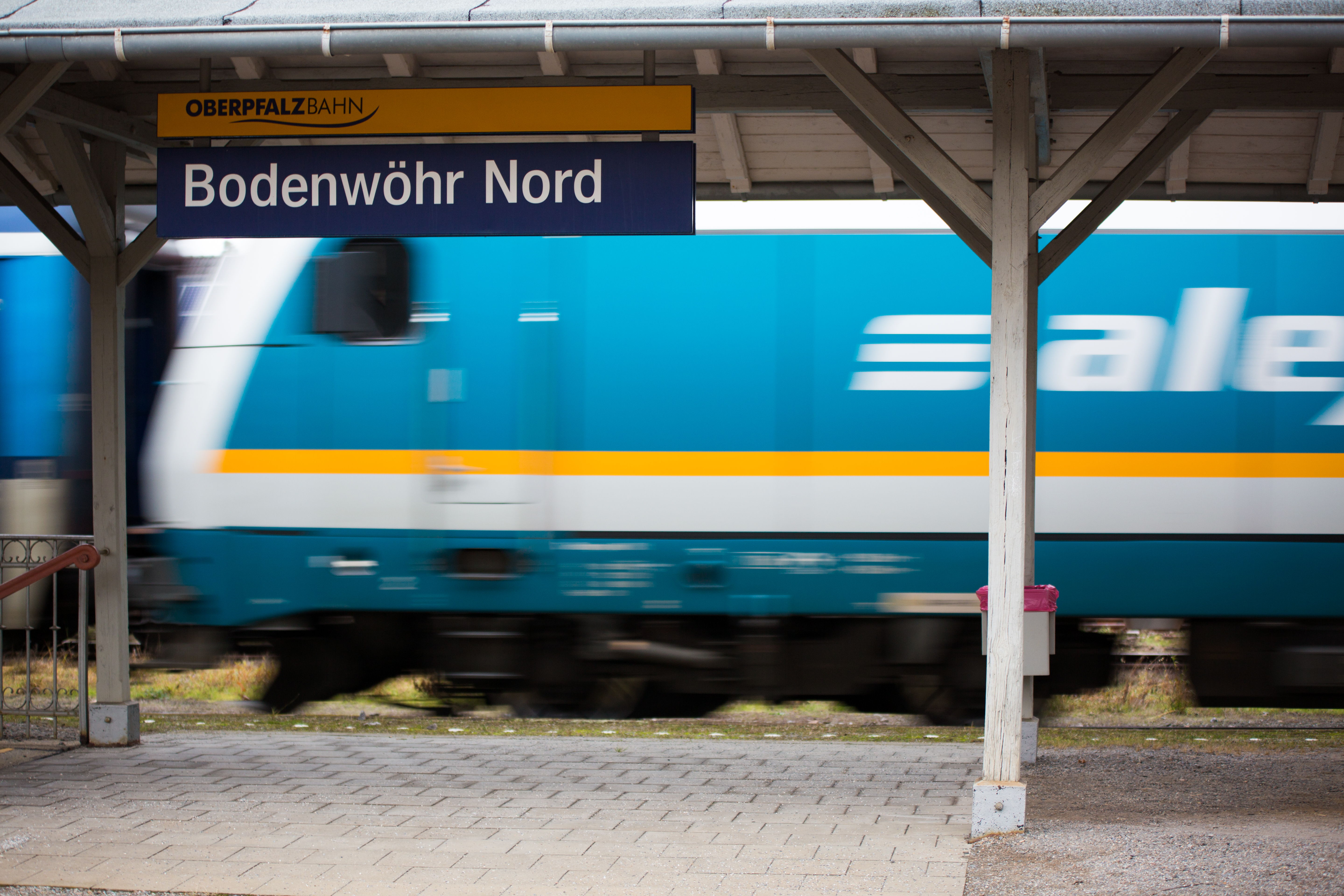 Bahnhof Bodenwöhr Nord